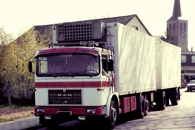 MAN-Büssing 22.320